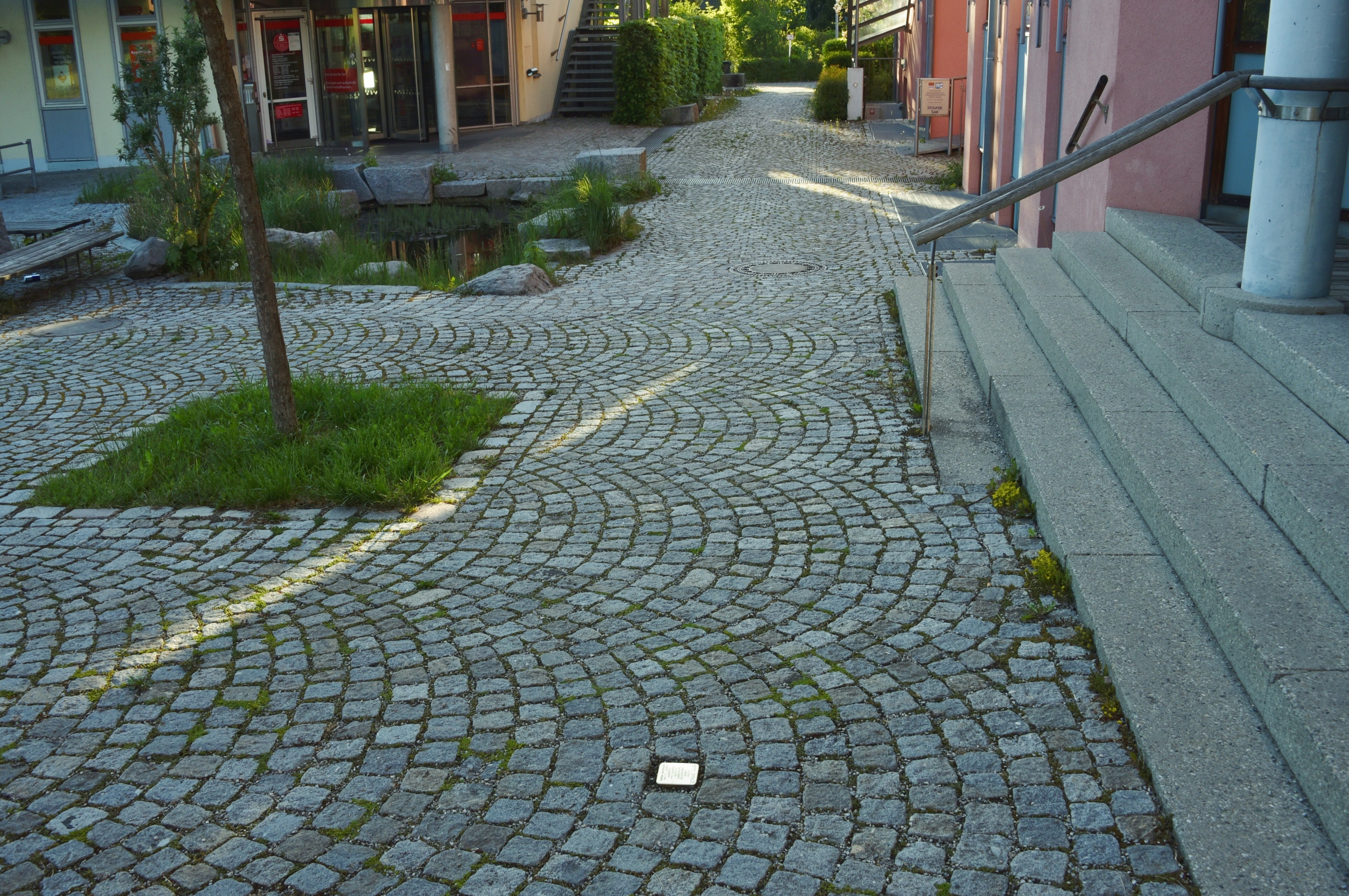 Stolperstein in Grafrath